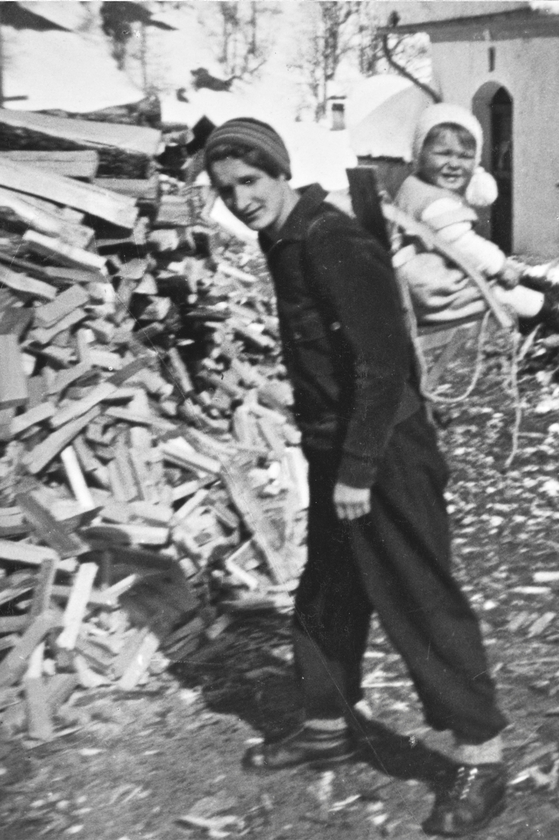 Greti Caprez-Rofler (1906–1994) war 1931 die erste Pfarrerin der Schweiz, die alleinverantwortlich eine Gemeinde (Furna GR) betreute. Das Foto zeigt sie in dem Bündner Dorf mit ihrem ersten Kind im Räf (Rückentrage).